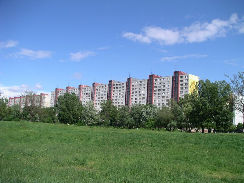 Paneláky Gessayovej ulice. Poloha: 48°07.135N 17°06.473E Mesto: Bratislava, Slovensko